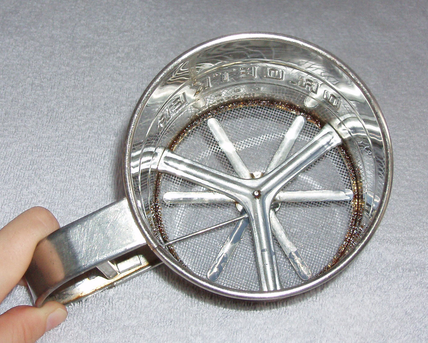 altes Puderzuckersieb